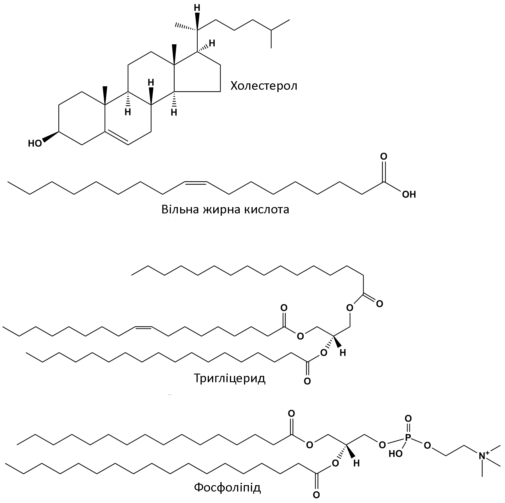 Приклади хімічної будови основних гурп ліпідів